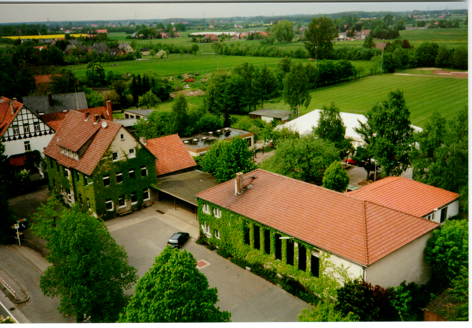 Grundschule Kutenhausen bei Minden, Nordrhein-Westfalen. Das linke Gebäude (mit Anbau) beinhaltet die Hausmeisterwohnung im Obergeschoss. Dahinter der Pavilon zu sehen, der bis 2008 stand. Im mittleren Bereich die Pausenhalle mit Toiletten, Rektorbüro und Durchgang zum Sportplatz. Rechts die Turnhalle mit Lehrerzimmer, Bücherei, im hinteren Bereich die Umkleideräume. Zu sehen ist auch der "Festplatz" von Kutenhausen, hier mit Festzelt. Anstelle der Pausenhalle entstand 1995 der Anbau mit weiteren Klassenräumen, Toiletten und das Forum, indem schulische und nicht-schulische Veranstaltungen stattfinden.